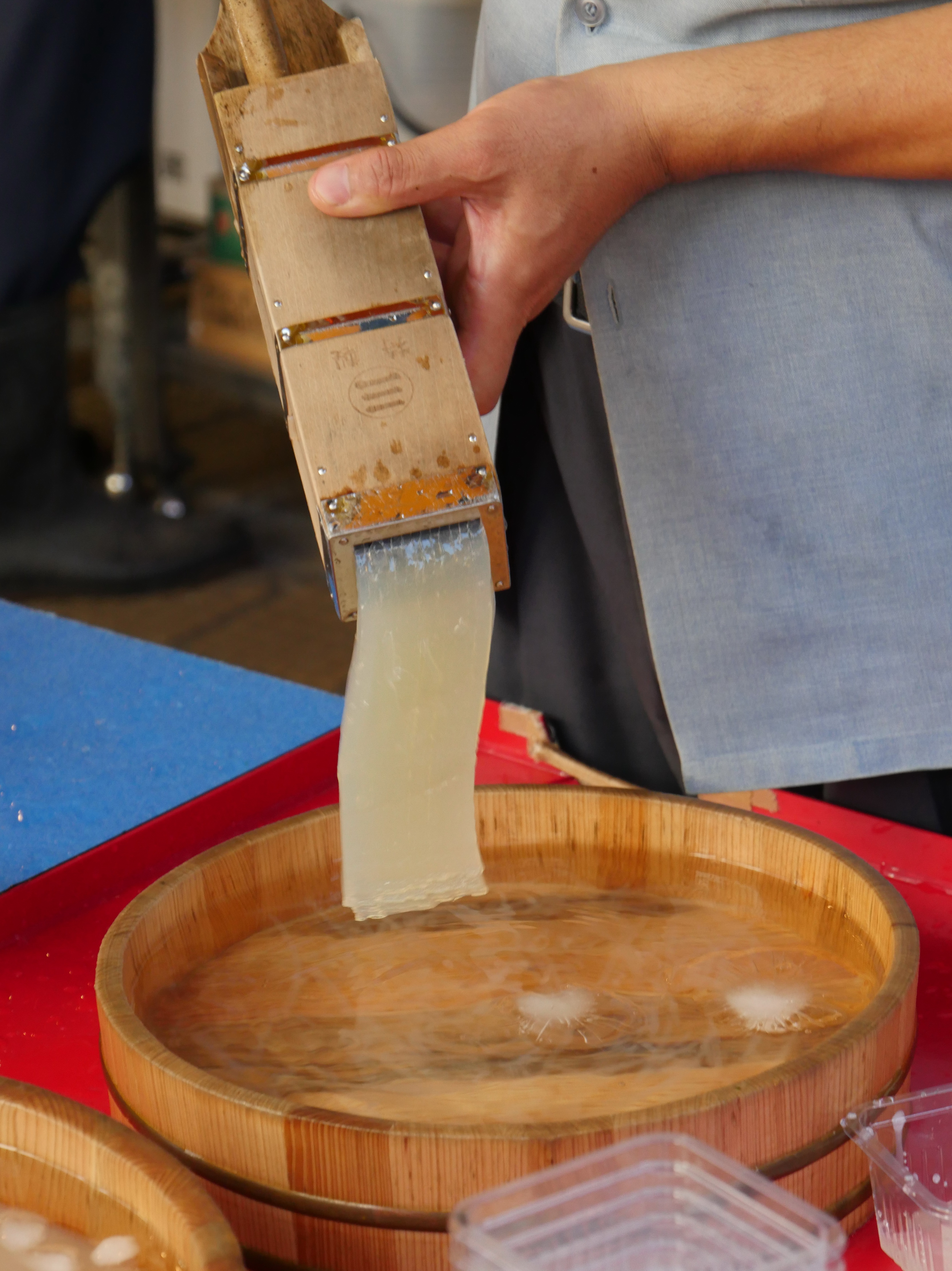 築地